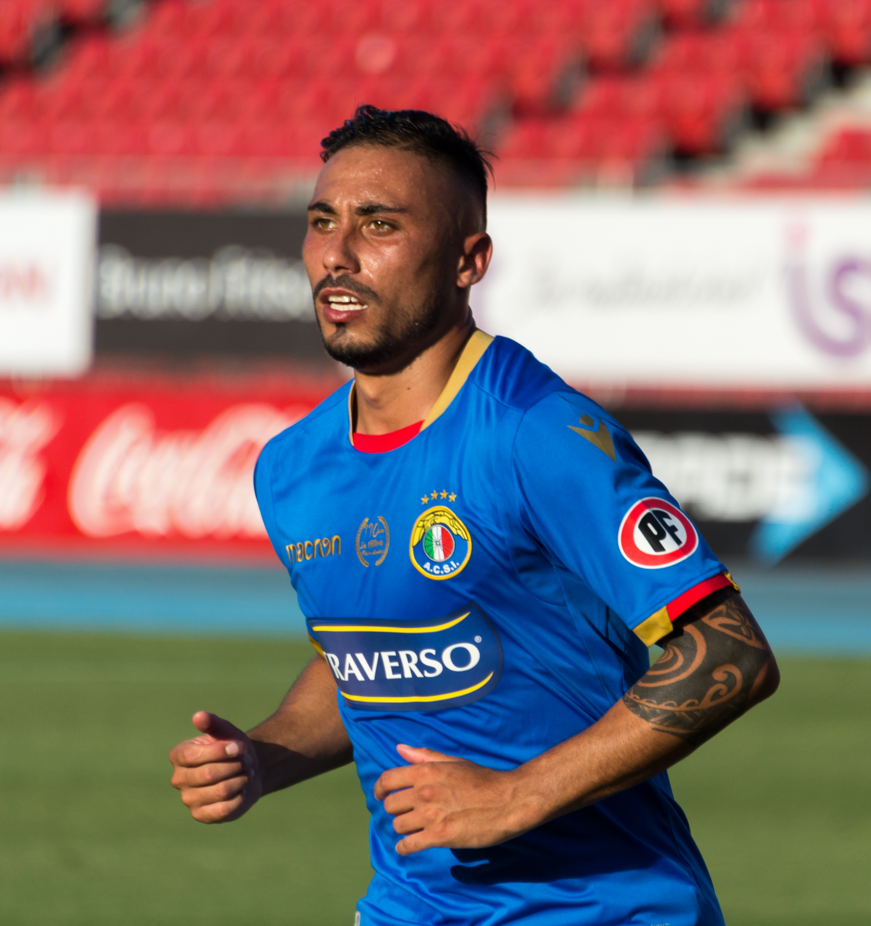 Audax Italiano v Colo-Colo, Estadio Nacional, Ñuñoa, Santiago, Región Metropolitana, Chile